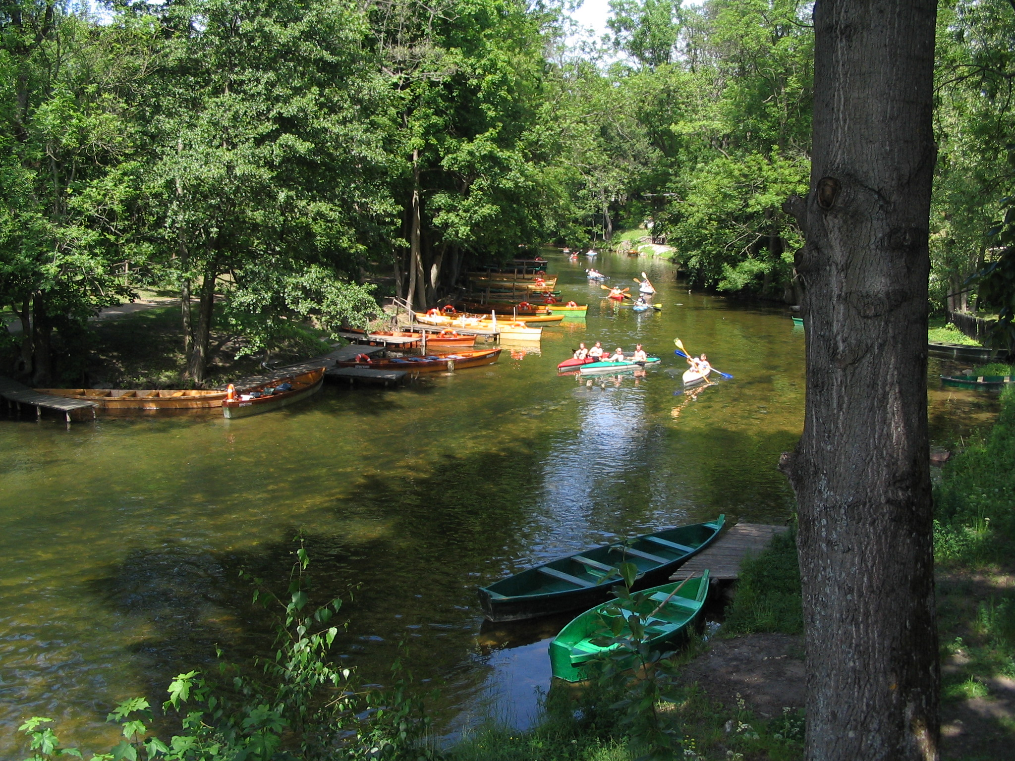 Splyw Krutynią w Krutyniu. Author:Piotr Tysarczyk